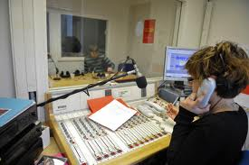 Antxeta Irratia (Hendaia) estudioak